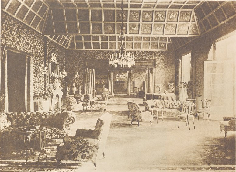 Empfangsräume des deutschen Kaiserlichen Gesandten in Peking um 1900 im Ministergebäude des Campus der deutschen Gesandtschaft fotografiert vom damaligen Gesandten Alfons von Mumm.